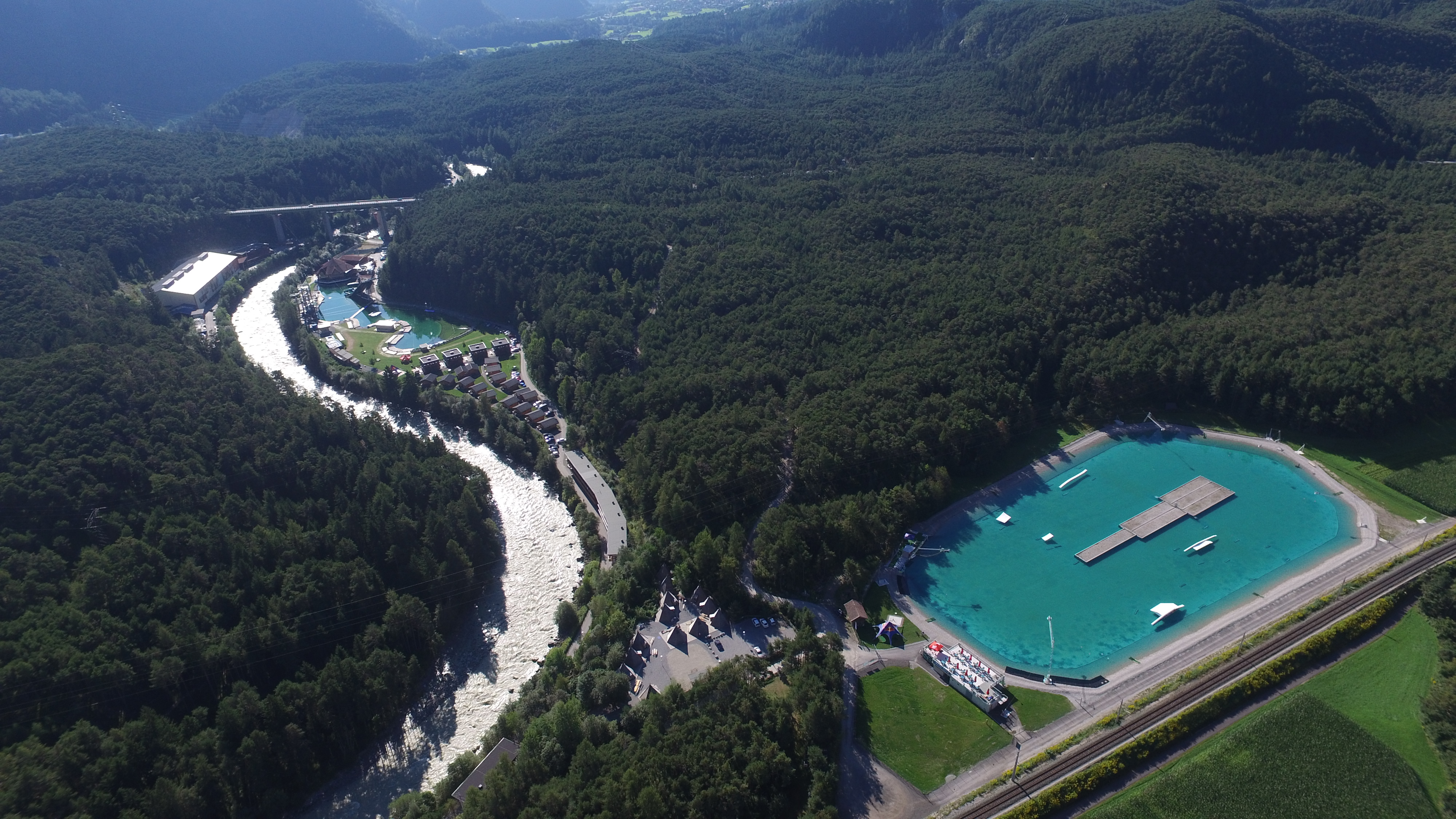 Draufsicht AREA 47 vom Helikopter aus